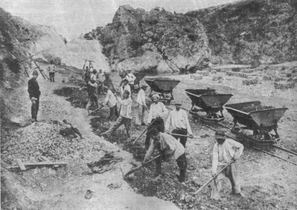 Язовир Въча в строеж